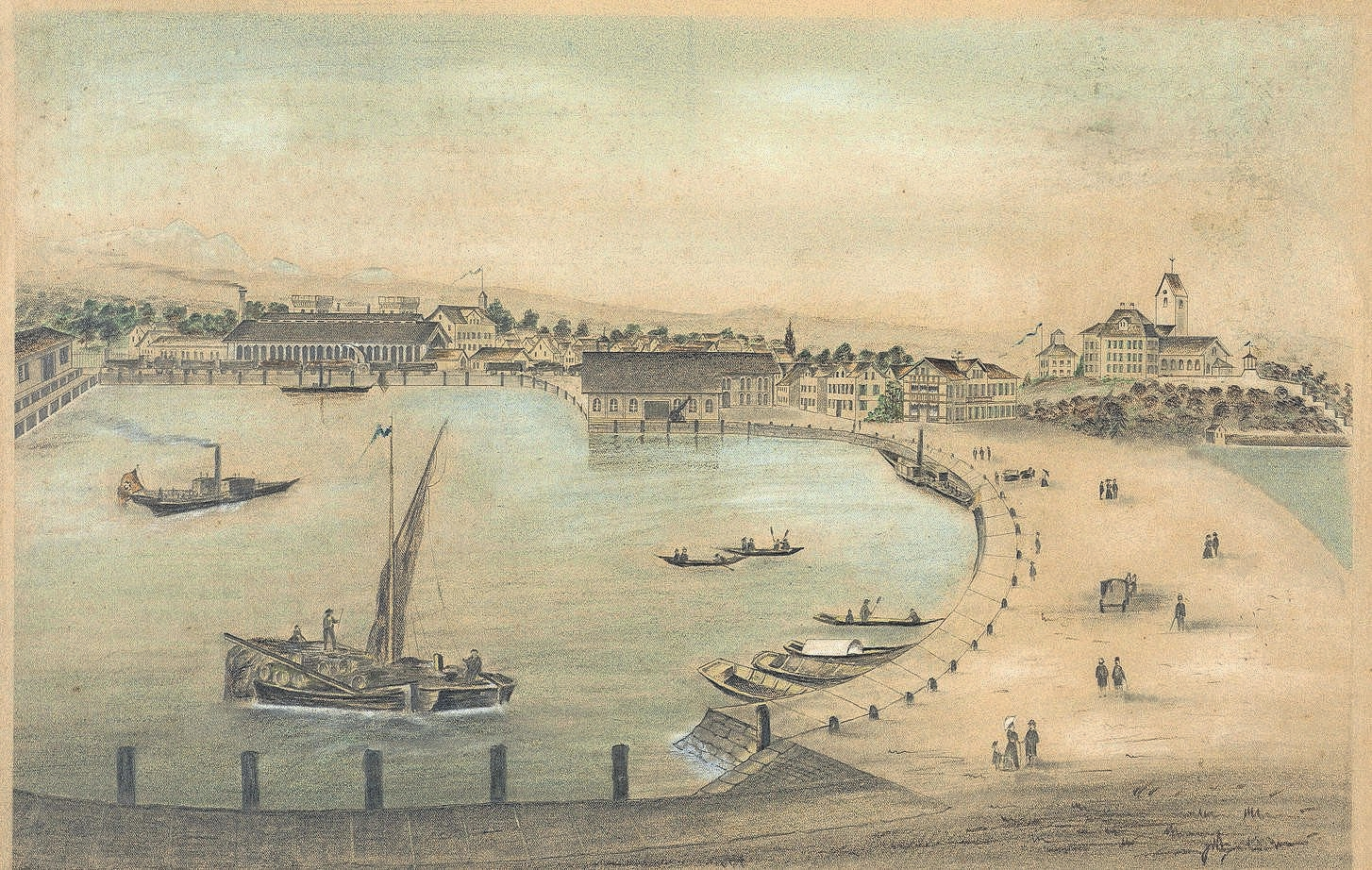 Der Hafen von Romanshorn um 1860 in einer 1905 von K. Steininger angefertigten Farbzeichnung.Um 1850 hatte Romanshorn den grössten Hafen am Bodensee und war ein wichtiger Umschlagplatz für Güter. Die Zeichnung zeigt die Gebäude der Nordostbahn. Romanshorn war einer der ersten Kopfbahnhöfe der Schweiz. Die Bahnhofhalle über den Gleisen wurde 1912 abgebrochen.